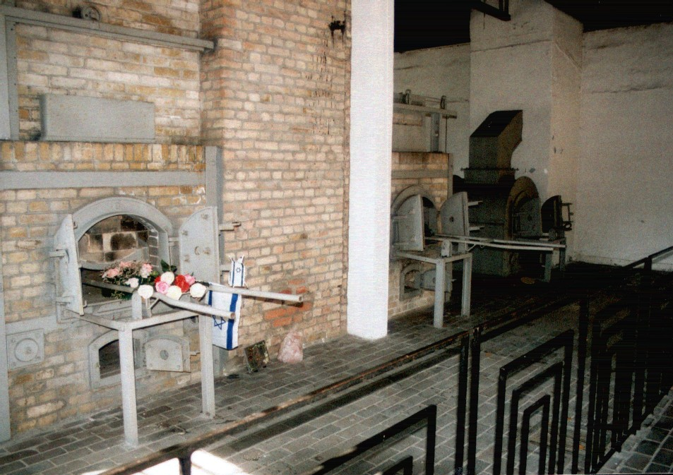 Mahn- und Gedenkstätte KZ Ravensbrück - Verbrennungsöfen im Krematorium